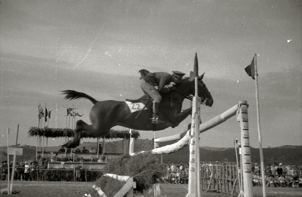 Título original: Concurso de salto en la hípica militar de Loiola (17/21) Localización: San Sebastián (Guipúzcoa)